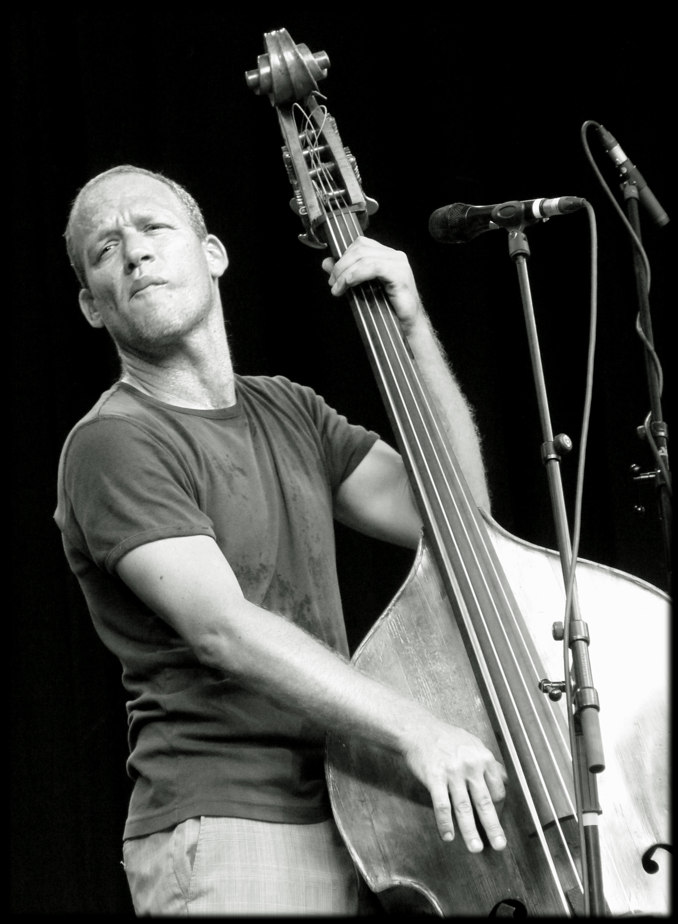 Avishai Cohen lors du concert donné au Brosella Folk et Jazz 2010.